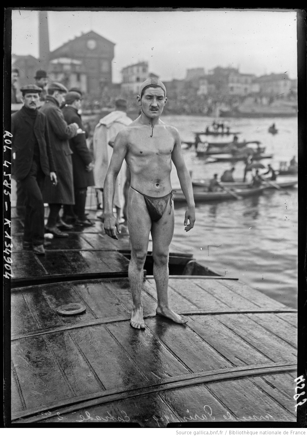 le nageur estrade 2eme de la traversée de paris 1909.